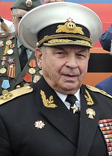 Адмирал флота Алексей Иванович Сорокин на военном параде в честь 67-й годовщины Великой Победы